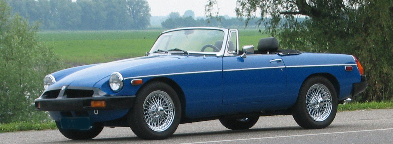 MG MGB Rubber bumper, bouwjaar 1977